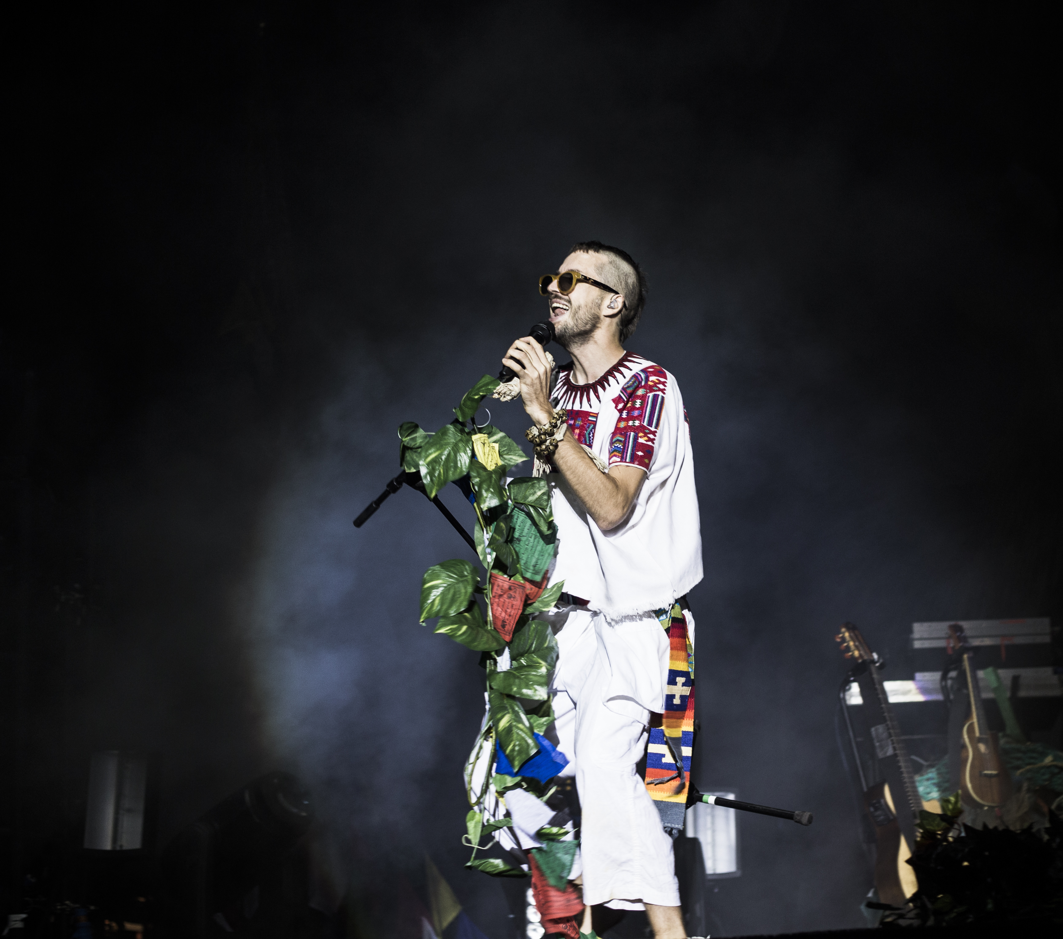 FIB 2015